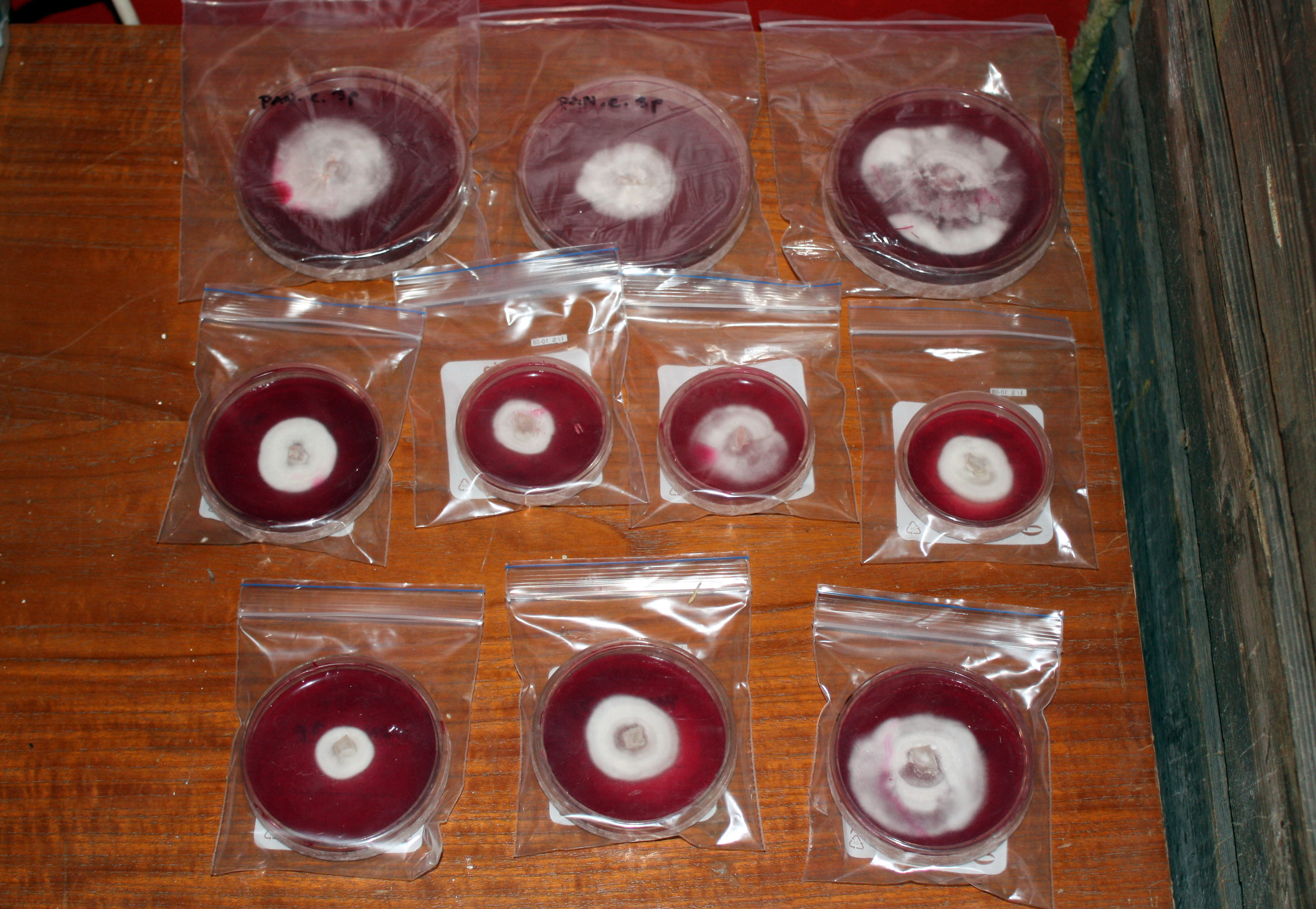 Panaeolus cyanescens agar-viljelmiä.